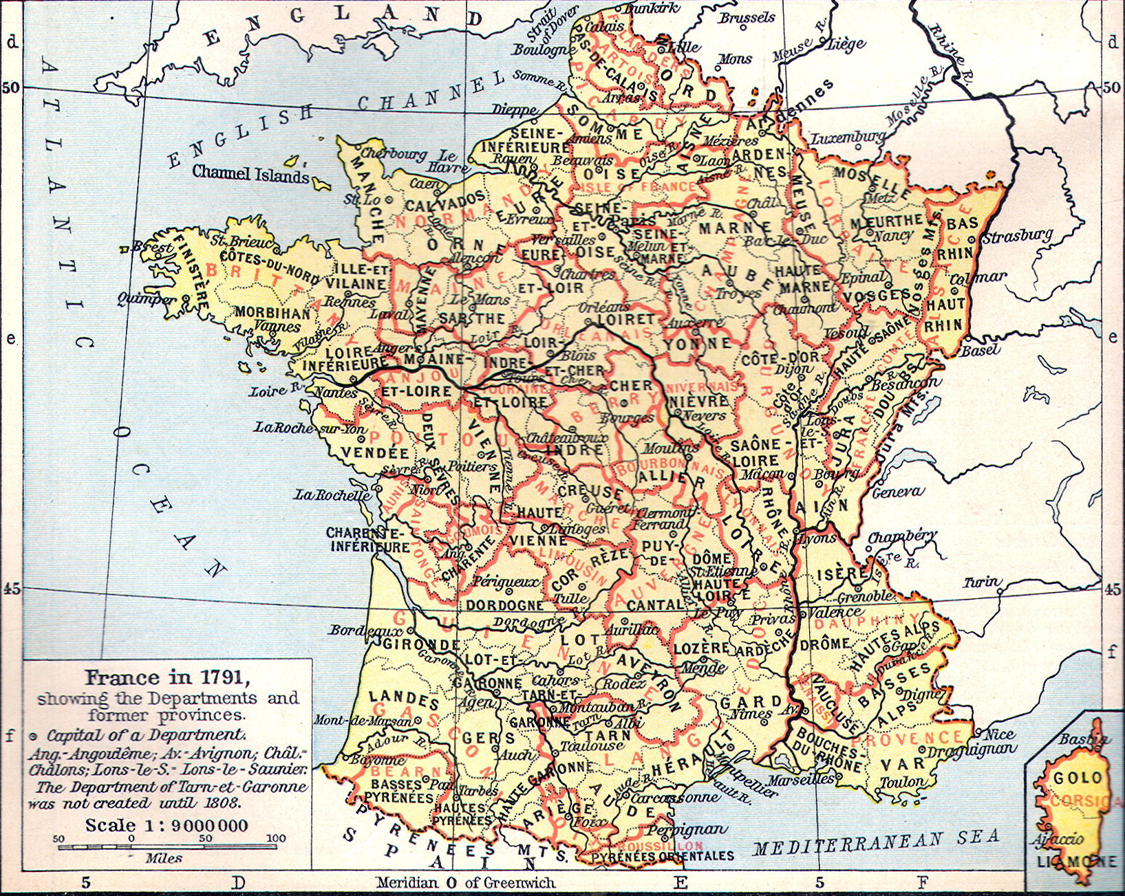 Carte de la France en 1791 (départements et anciennes provinces - en rouge) in The Historical Atlas by William R. Shepherd, 1926